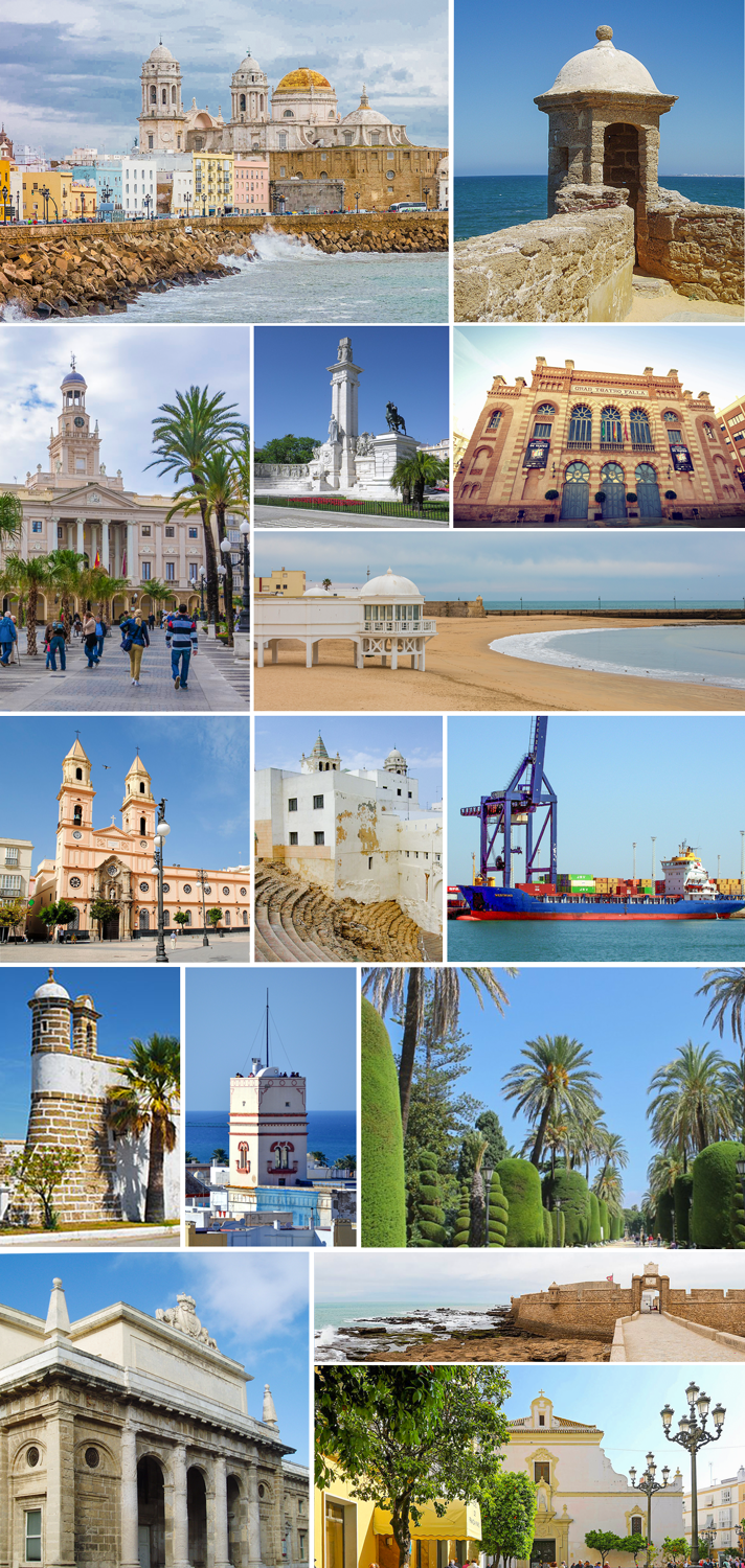 Fotografías representativas de Cádiz